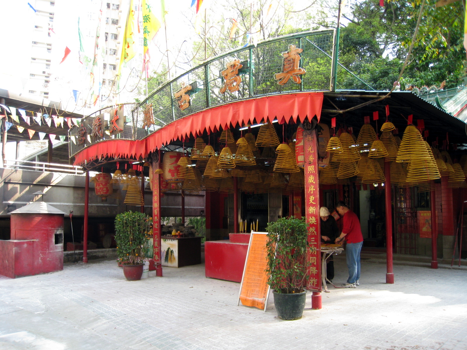 HK Chun Kwan Temple